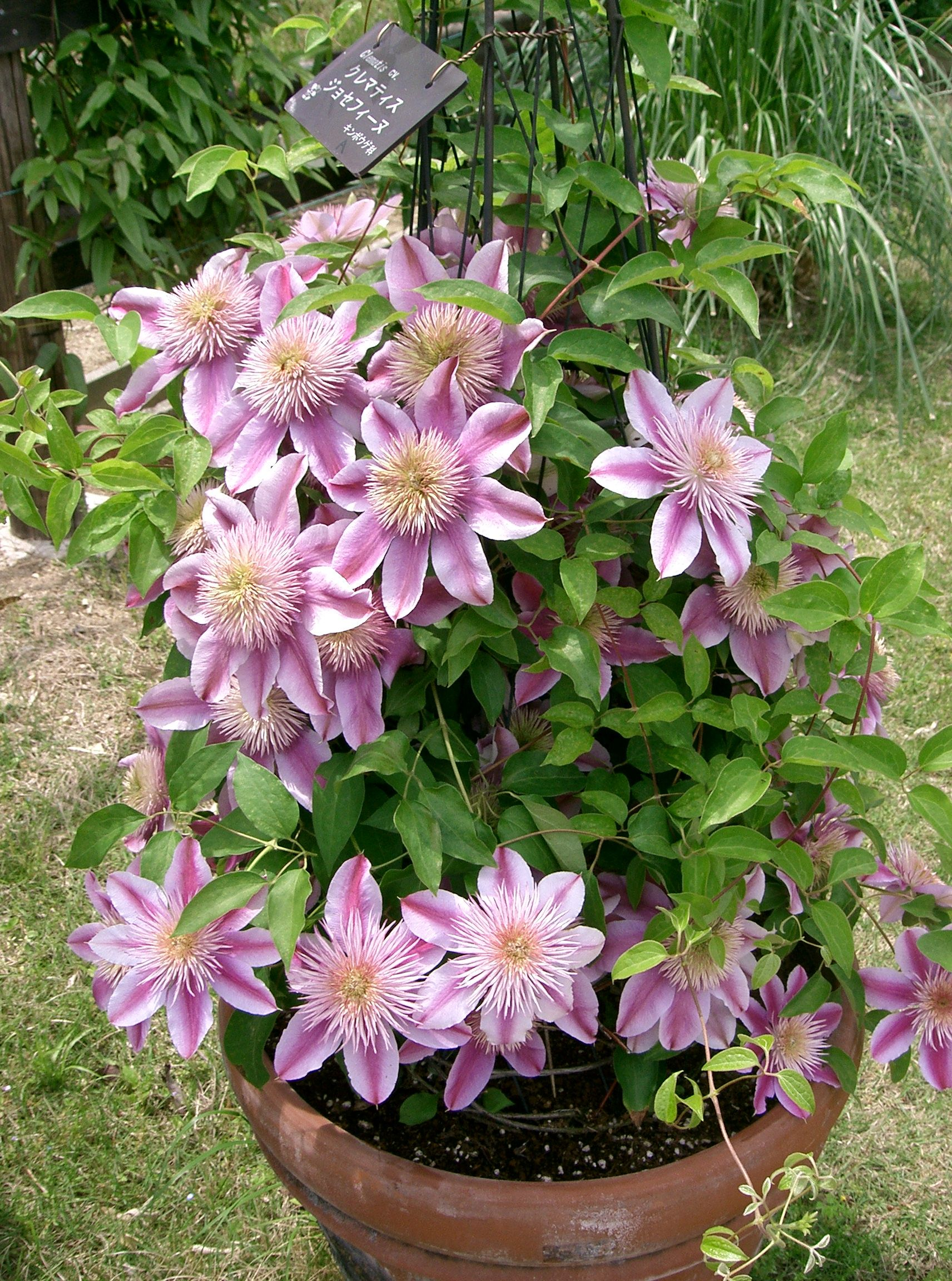 Clematis 'Evijohill' (JOSEPHINE™)